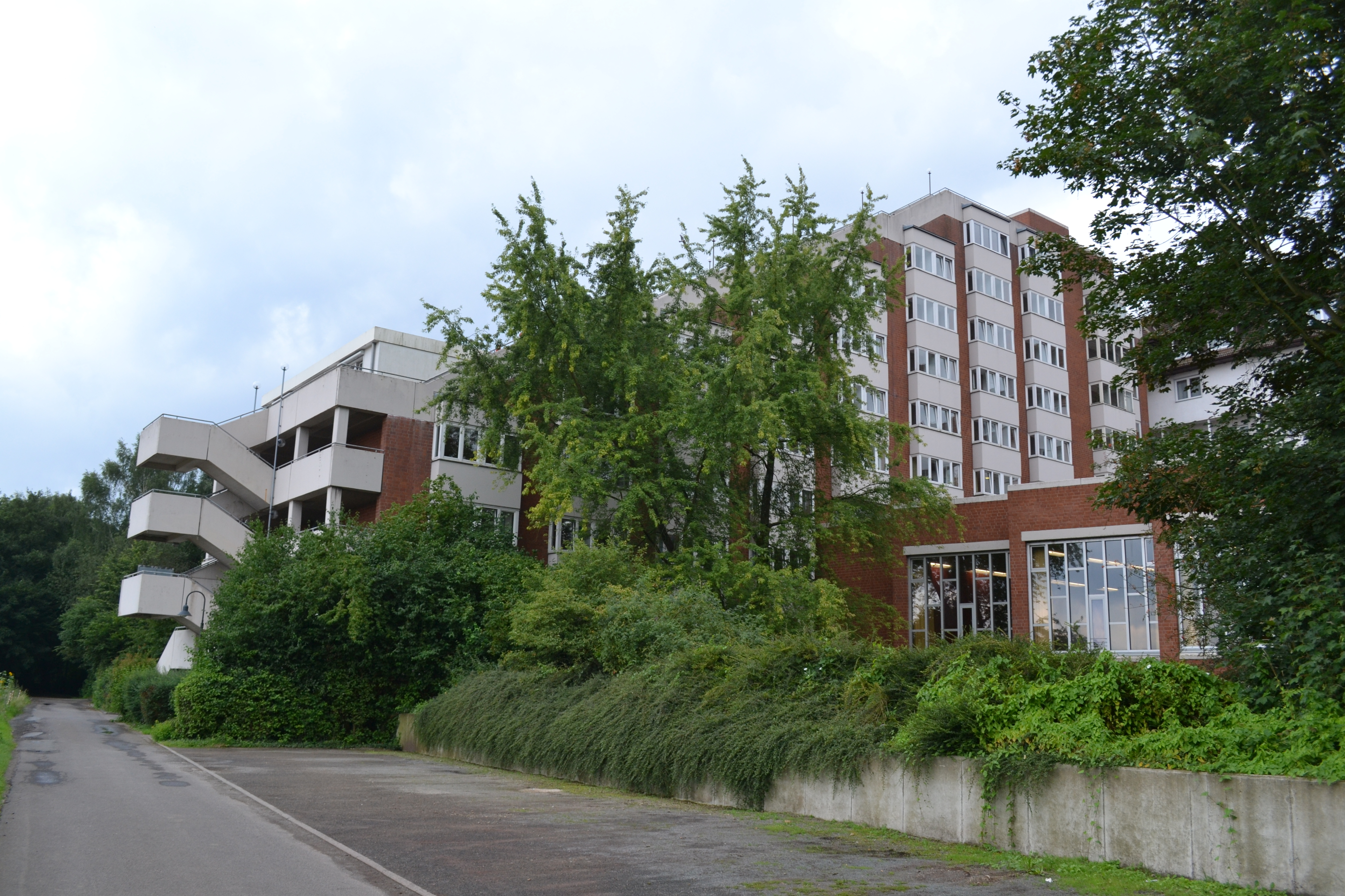 Terrassenhaus in Hopfenberg, Peterhagen.